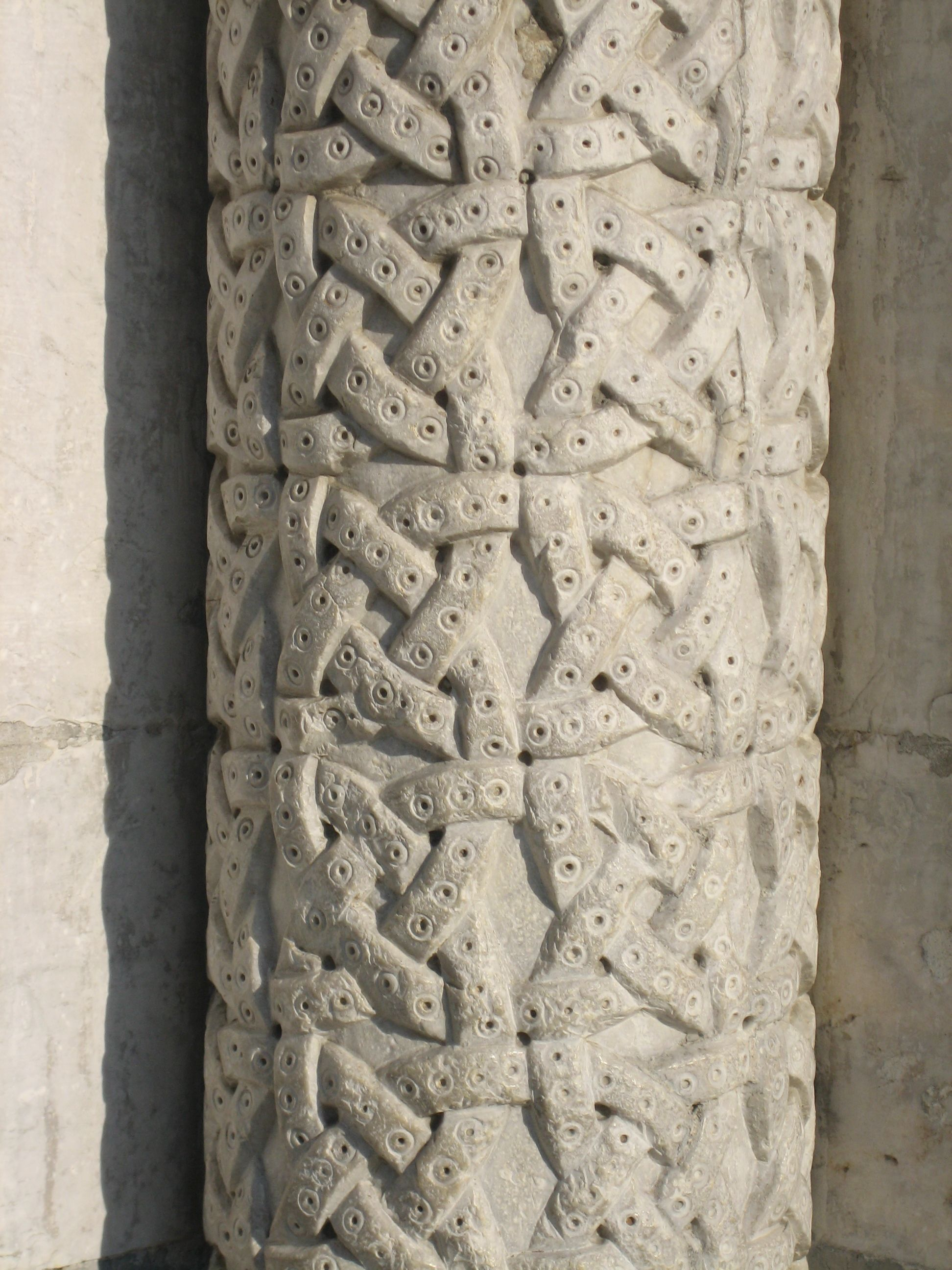 Duomo de Lucca, Italie.